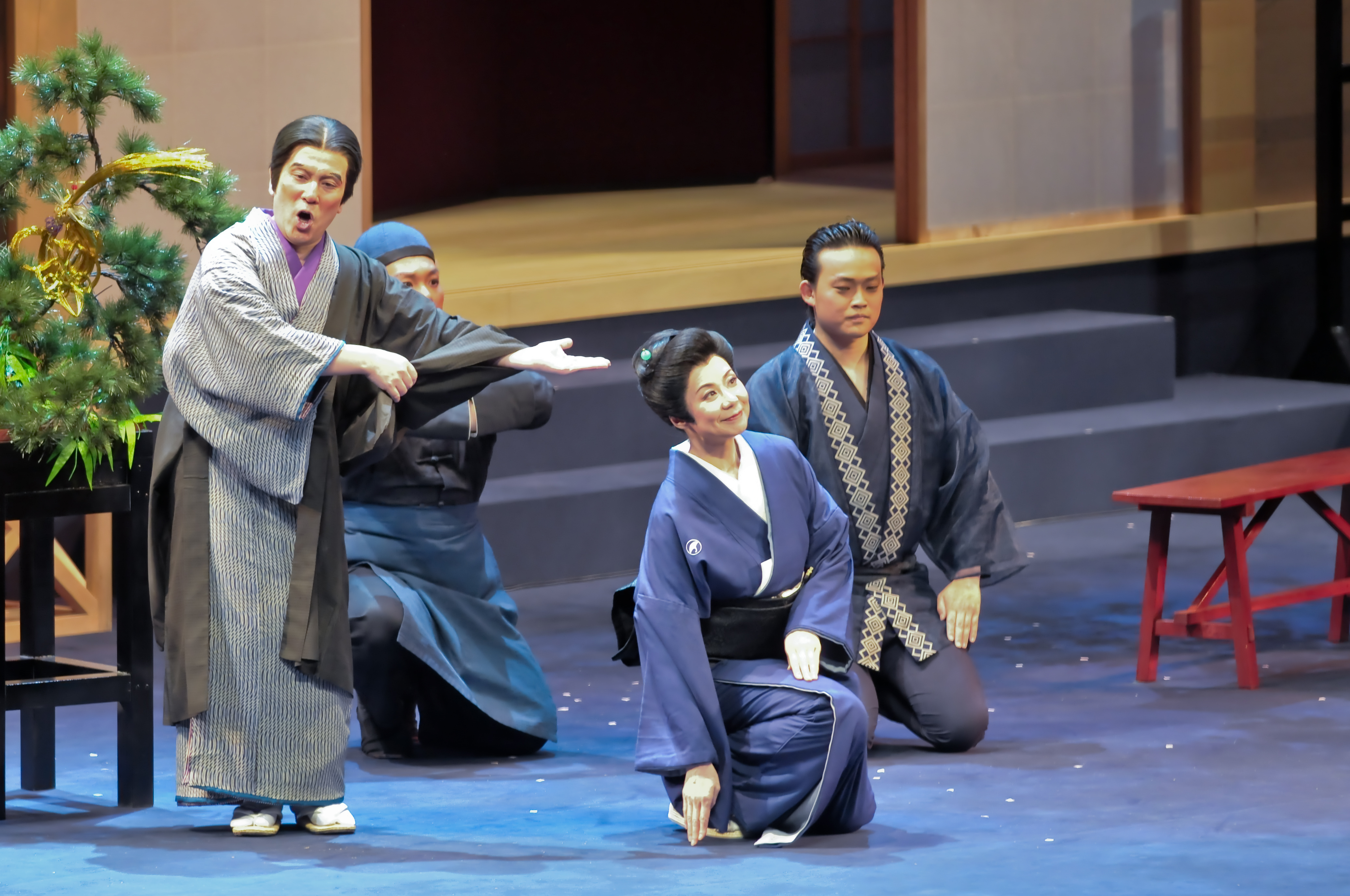 スズキ役として出演 兵庫県立芸術文化センターにて